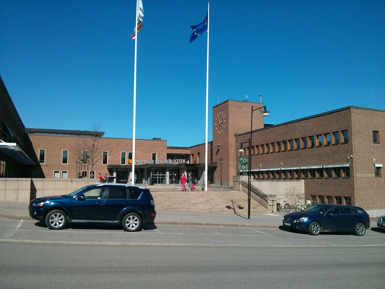 En bild på Mjölby stadshus och bibliotek.